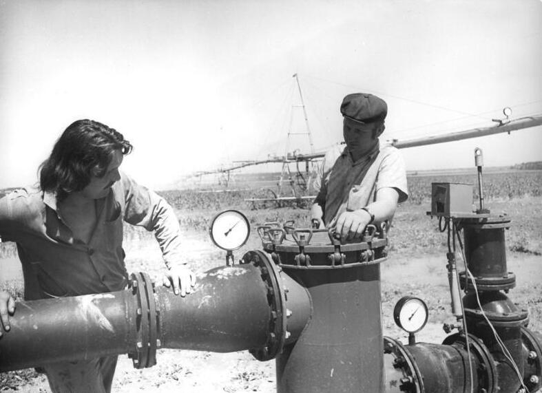 Glaubitz, Kontrolle einer Beregnungsanlage ADN-ZB Häßler 5.7.76 Bez. Dresden. Hitze: Der Druck an der Regneranlage muß exakt stimmen, wenn die modernen sowjetischen Fregat-Anlagen auf dem Gebiet der LPG Pflanzenproduktion Glaubitz, Kanalgebiet Riesa, effektiv arbeiten sollen. Gottfried Klinger und Olaf Bretschneider sorgen mit dafür, daß die Bewässerung der landwirtschaftlichen Kulturen in der gegenwärtigen Dürreperiode ausreichend gesichert ist. 8000 m³ Elbewasser werden pro Stunde verregnet. (vergl. R0705-7N)